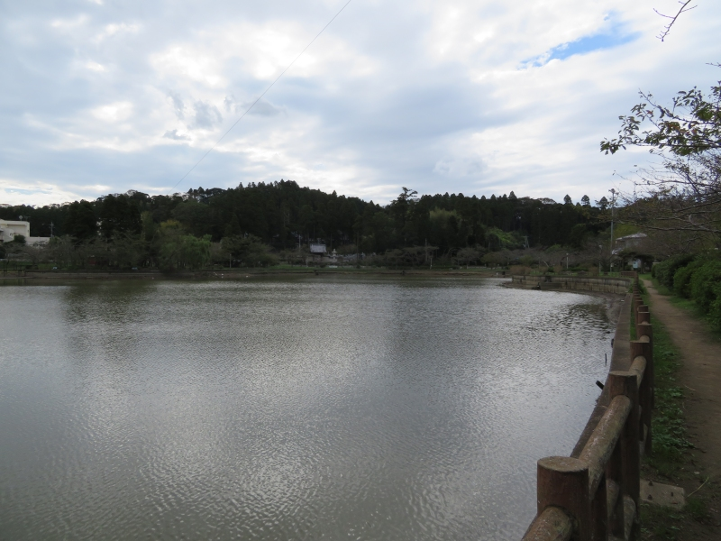 東金城遠景